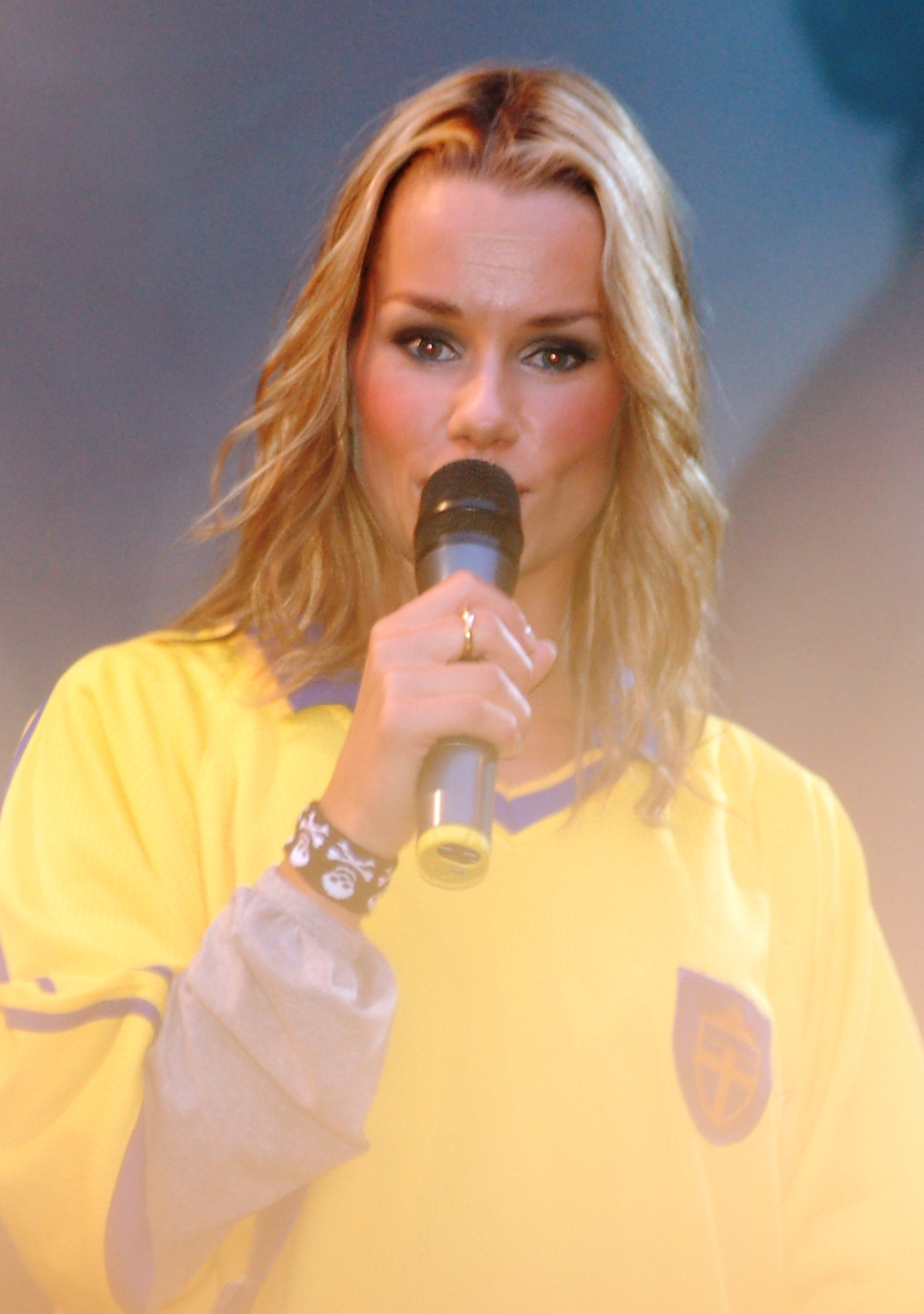 Linda Bengtzing i Norrköping